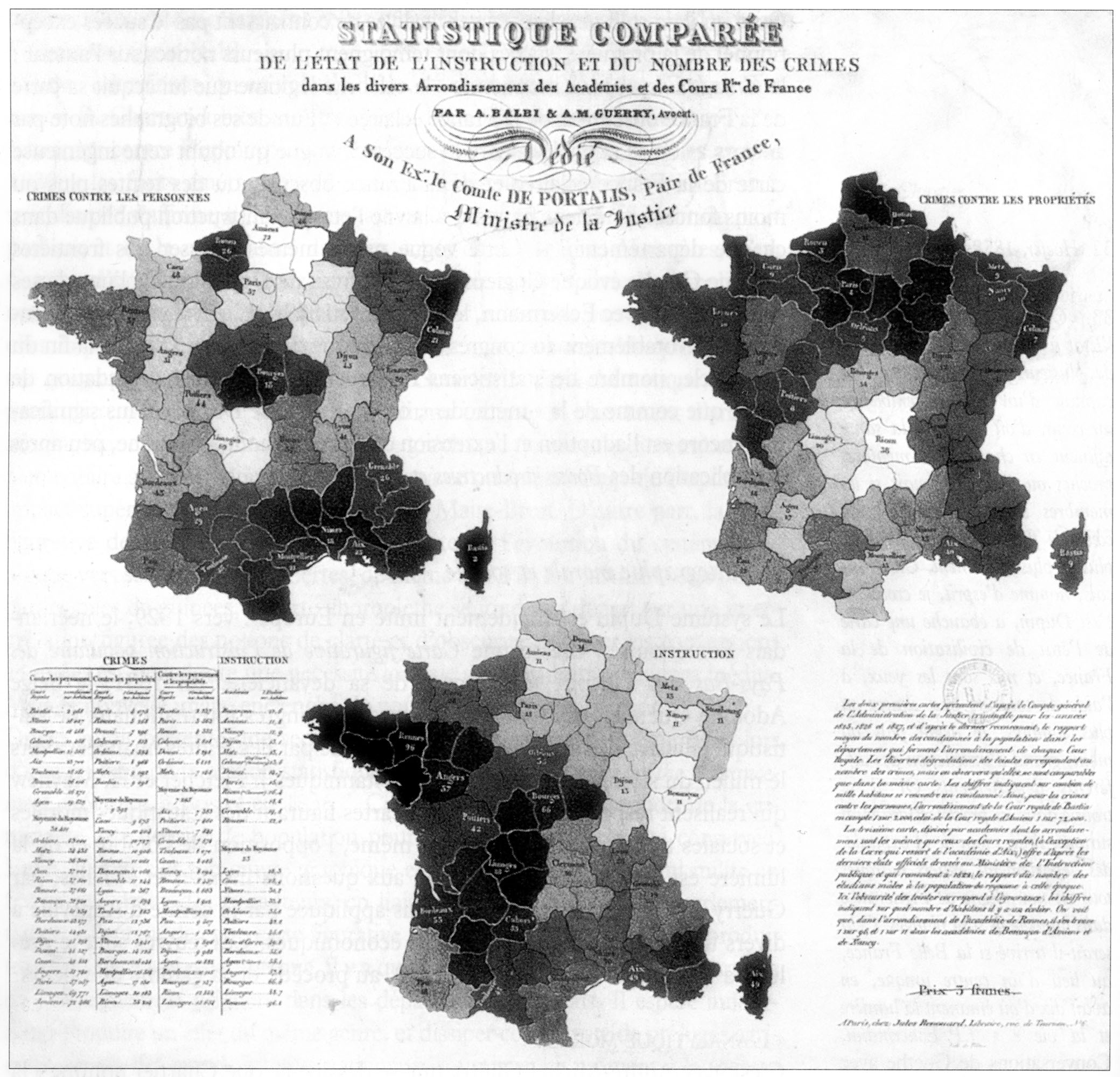 Adriano Balbi et André-Michel Guerry (1829). Statistique comparée de l'état de l'instruction et du nombre des crimes dans les divers arrondissements des académies et des cours royales de France Jules Renouard, Paris. BL:Tab.597.b.(38); BNF: Ge C 9014 .